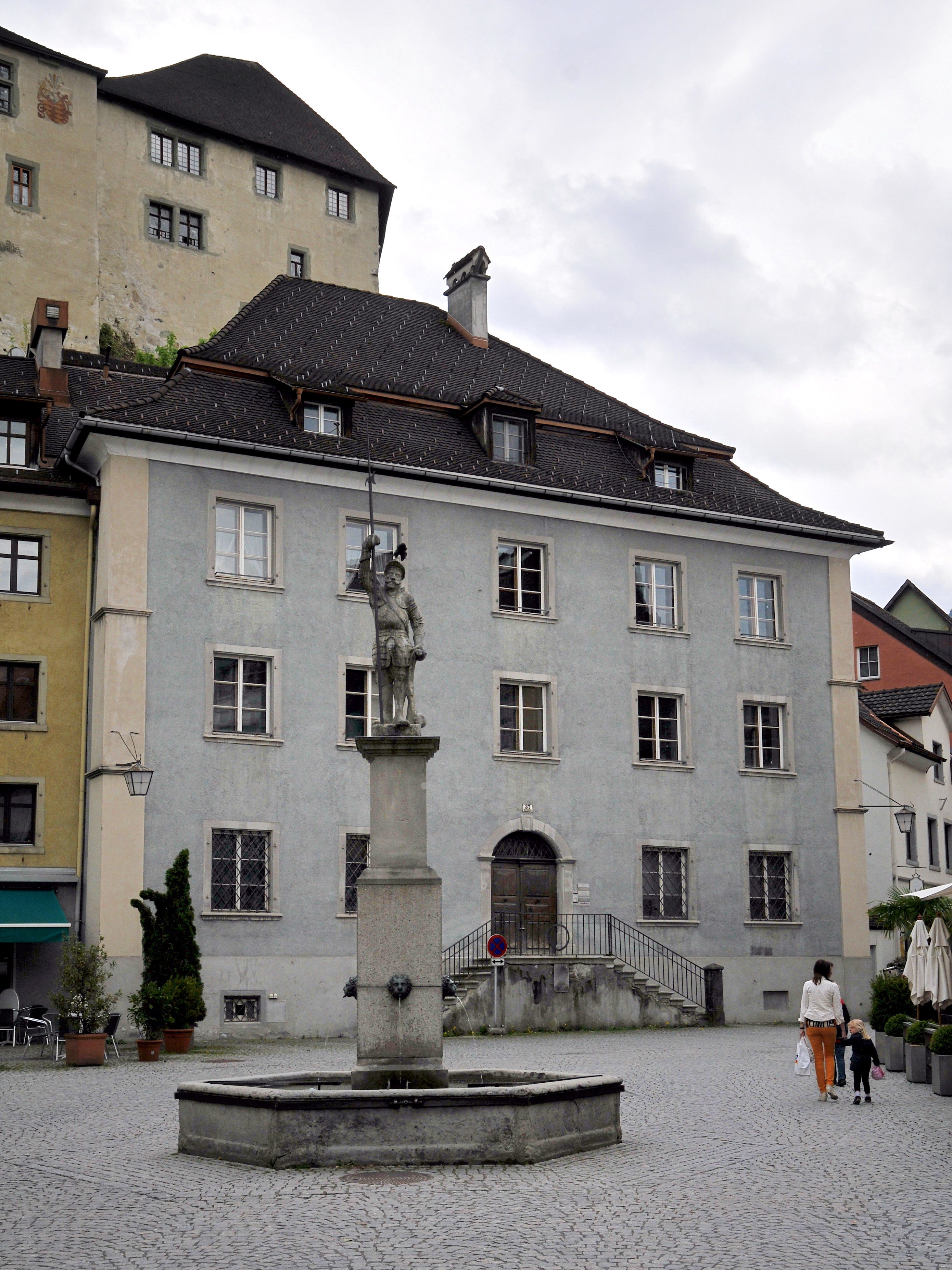 ehemals Stadtkanzlei, Neustadt Nr.37 in Feldkirch.